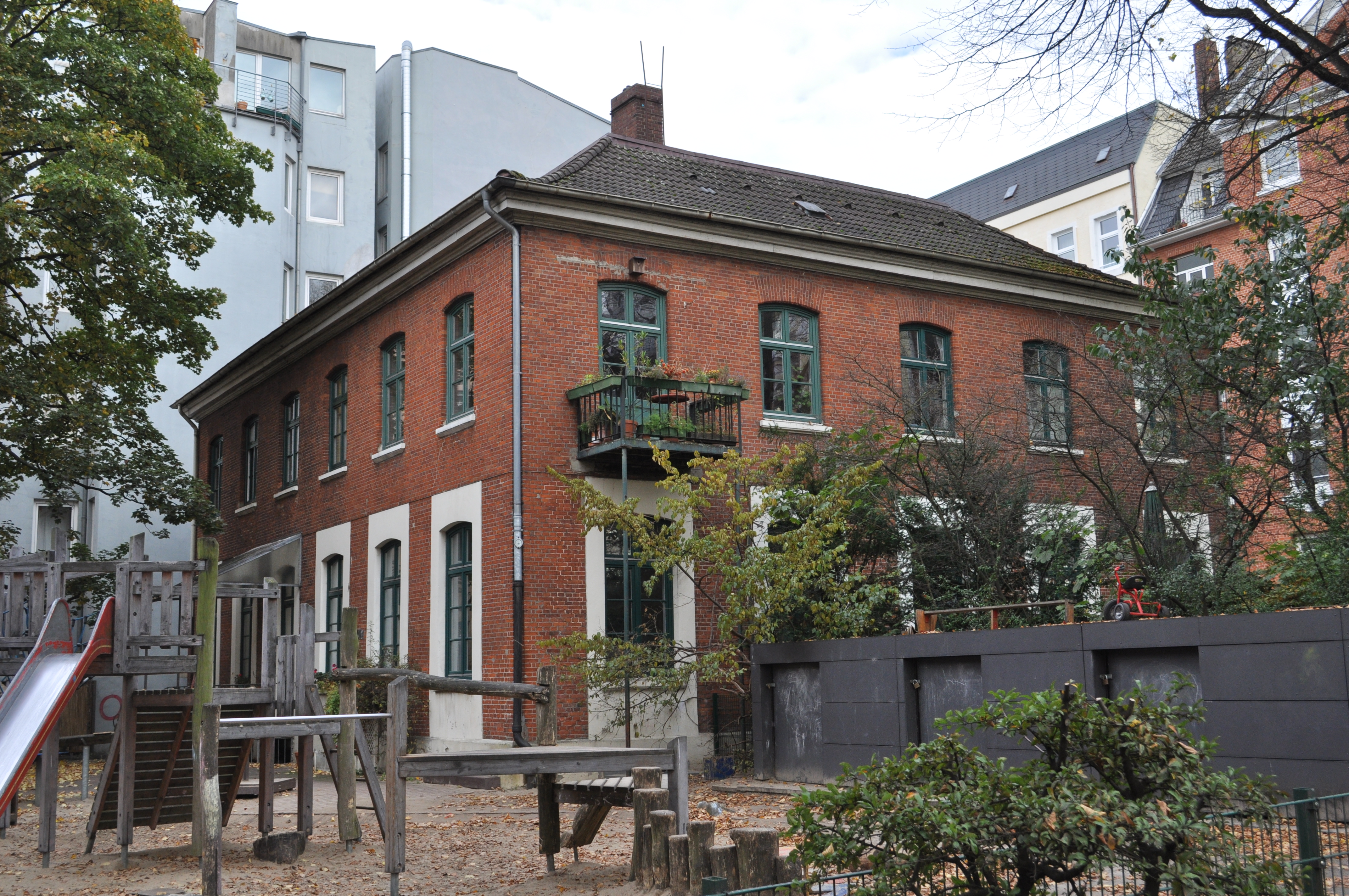 Haus Antonistraße 12 in Hamburg-Altona-Altstadt. Blick vom Kirchhof der St.-Pauli-Kirche. This is a photograph of an architectural monument.